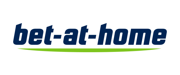 logo betathomecom_pl